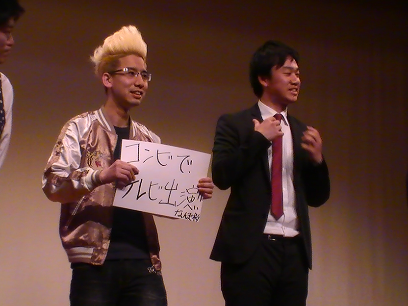 なんぶ桜 (2017年1月)